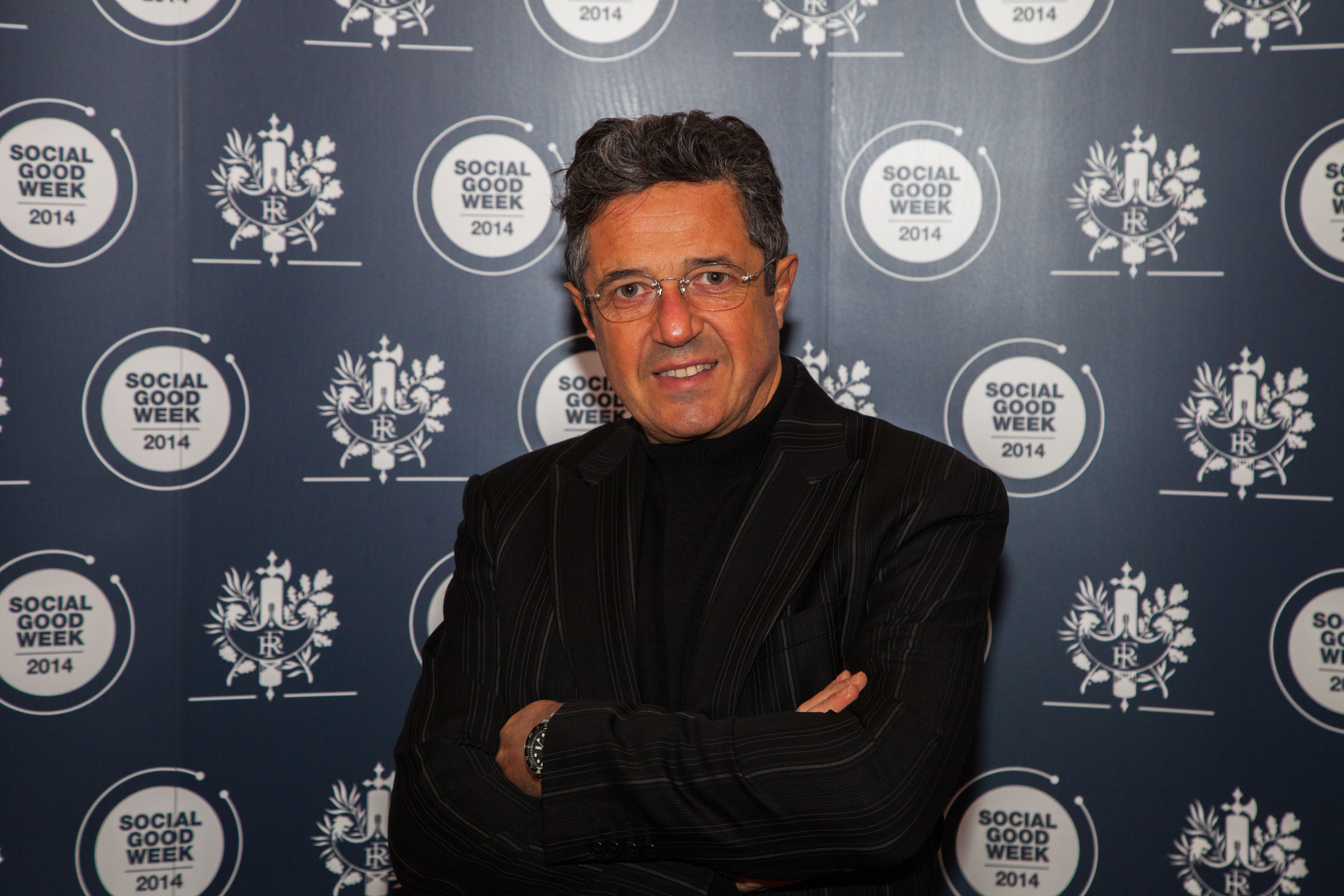 Christian Cascio lors de l’événement présidentiel de la Social Good Week 2014 à l'Elysée.